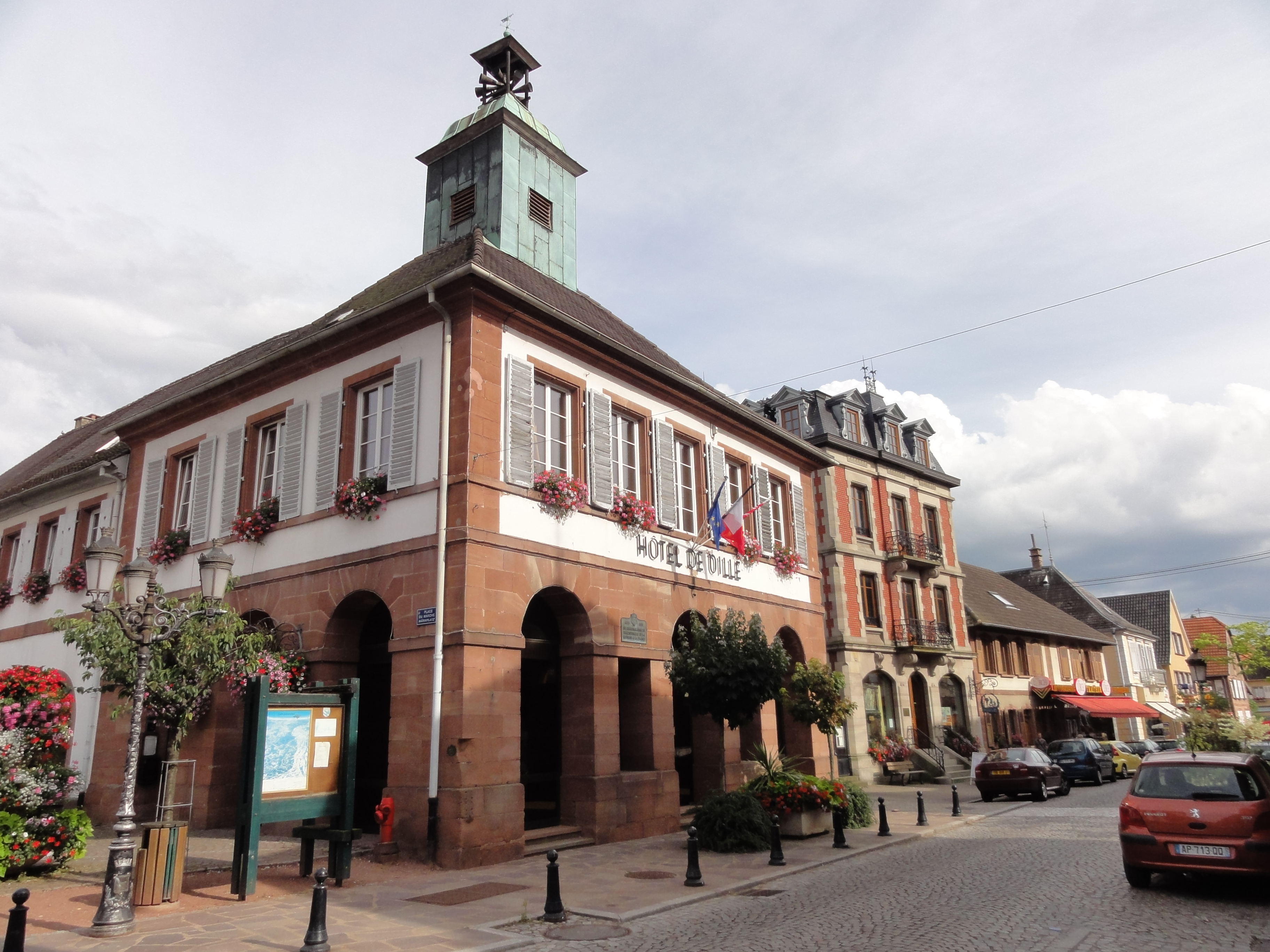 Alsace, Bas-Rhin, Ingwiller, Hôtel de Ville (XIXe): It is indexed in the Base Mérimée, a database of architectural heritage maintained by the French Ministry of Culture, under the references PA00084755 and IA67009761.